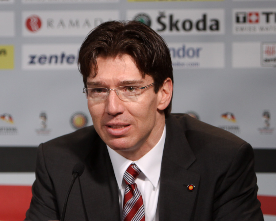 Uwe Krupp bei einem Interview als DEB Coach 2009